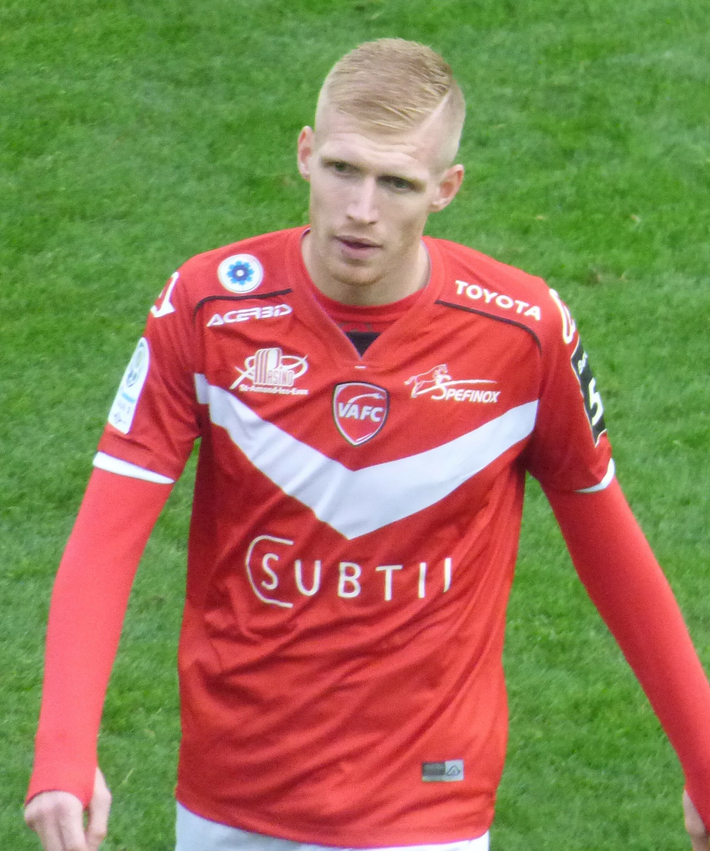 Gaëtan Robail lors du match Valenciennes FC / RC Lens, comptant pour la quatorzième journée du championnat de France de Ligue 2 2018-2019, le 10 novembre 2018, au Stade du Hainaut.